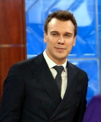 Телеведущий канала «Дождь» Михаил Зыгарь.